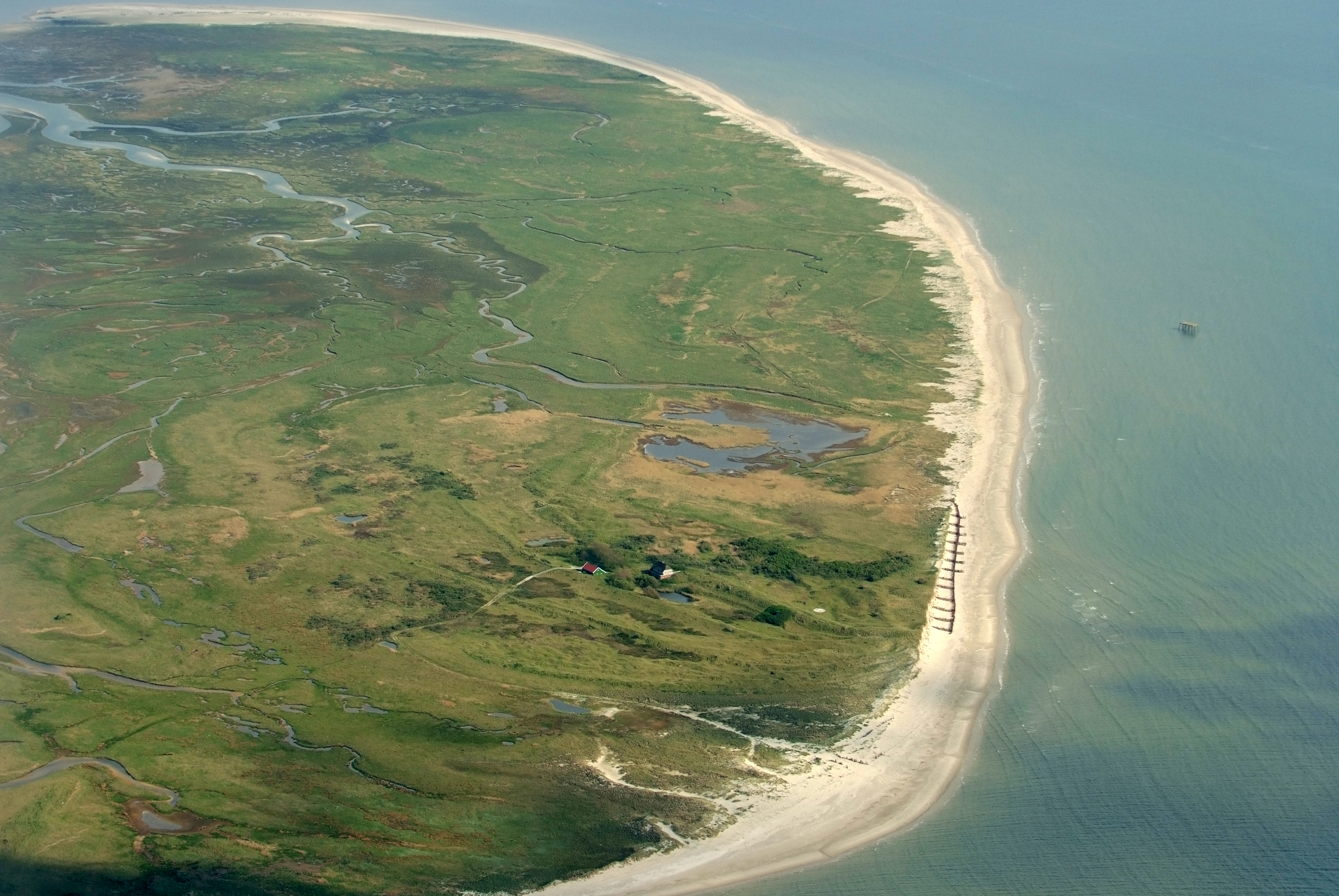 Fotoflug vom Flugplatz Nordholz-Spieka über Bremerhaven, Wilhelmshaven und die Ostfriesischen Inseln bis Borkum Nordseeinsel Memmert